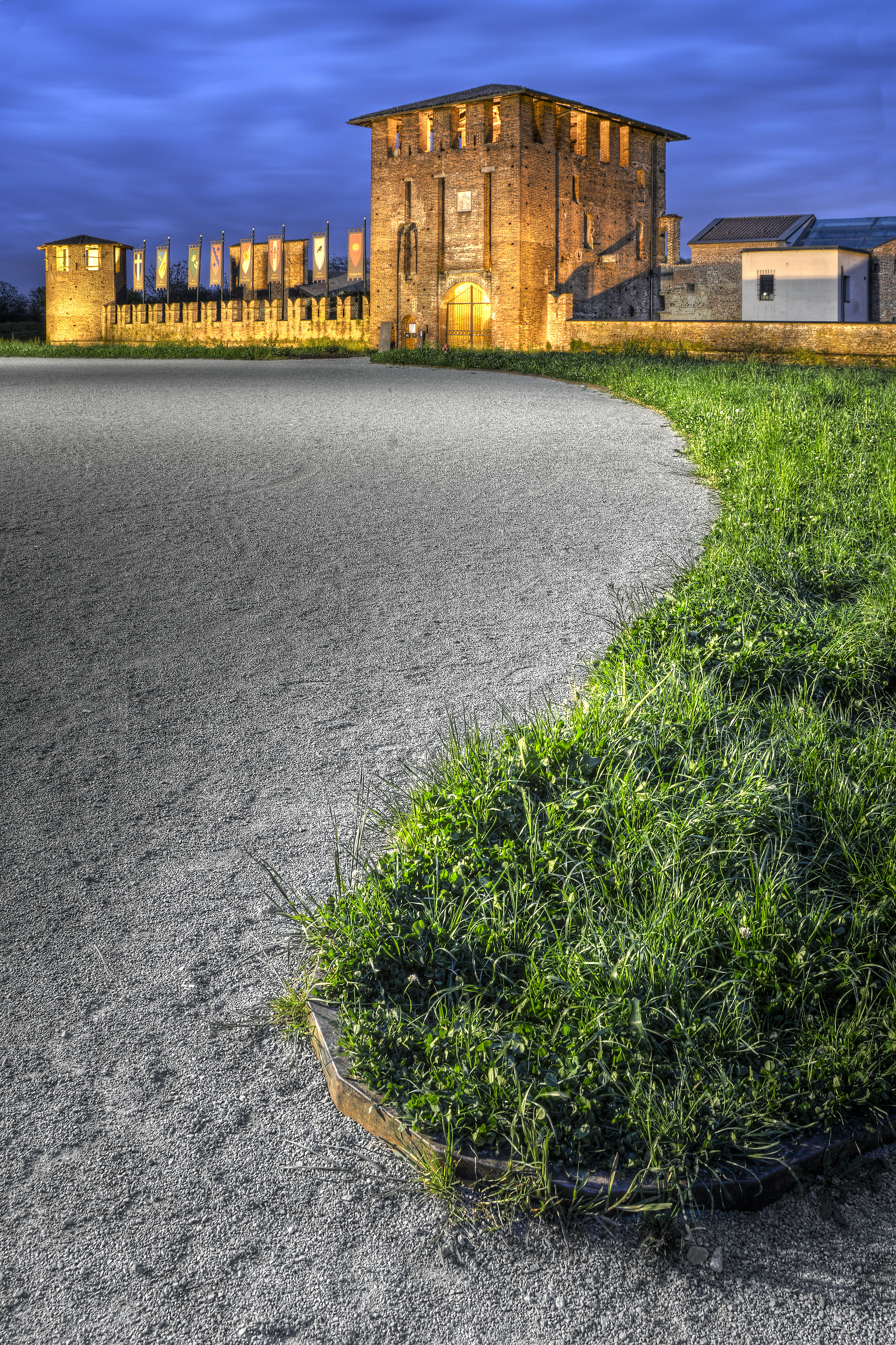 Castello di San Giorgio This is a photo of a monument which is part of cultural heritage of Italy.